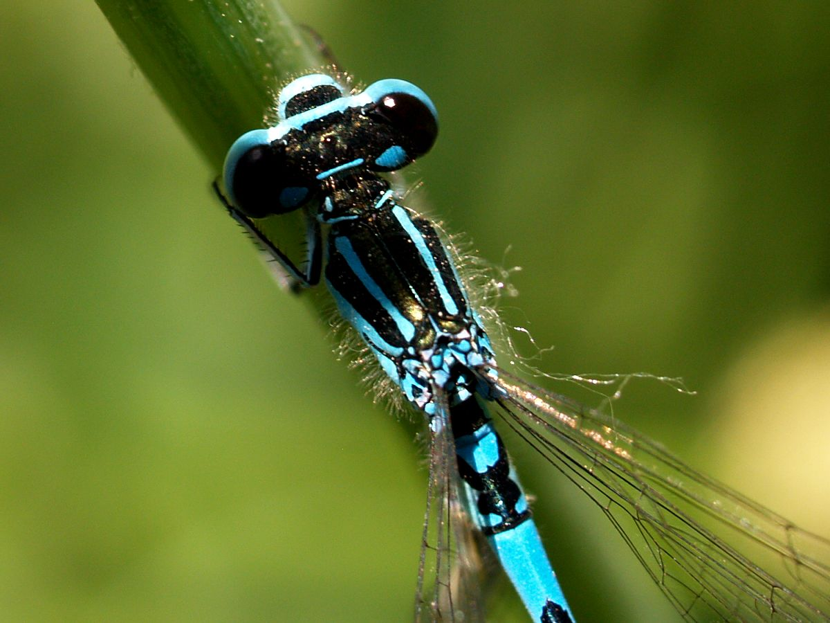 Coenagrion mercuriale marca mercuri